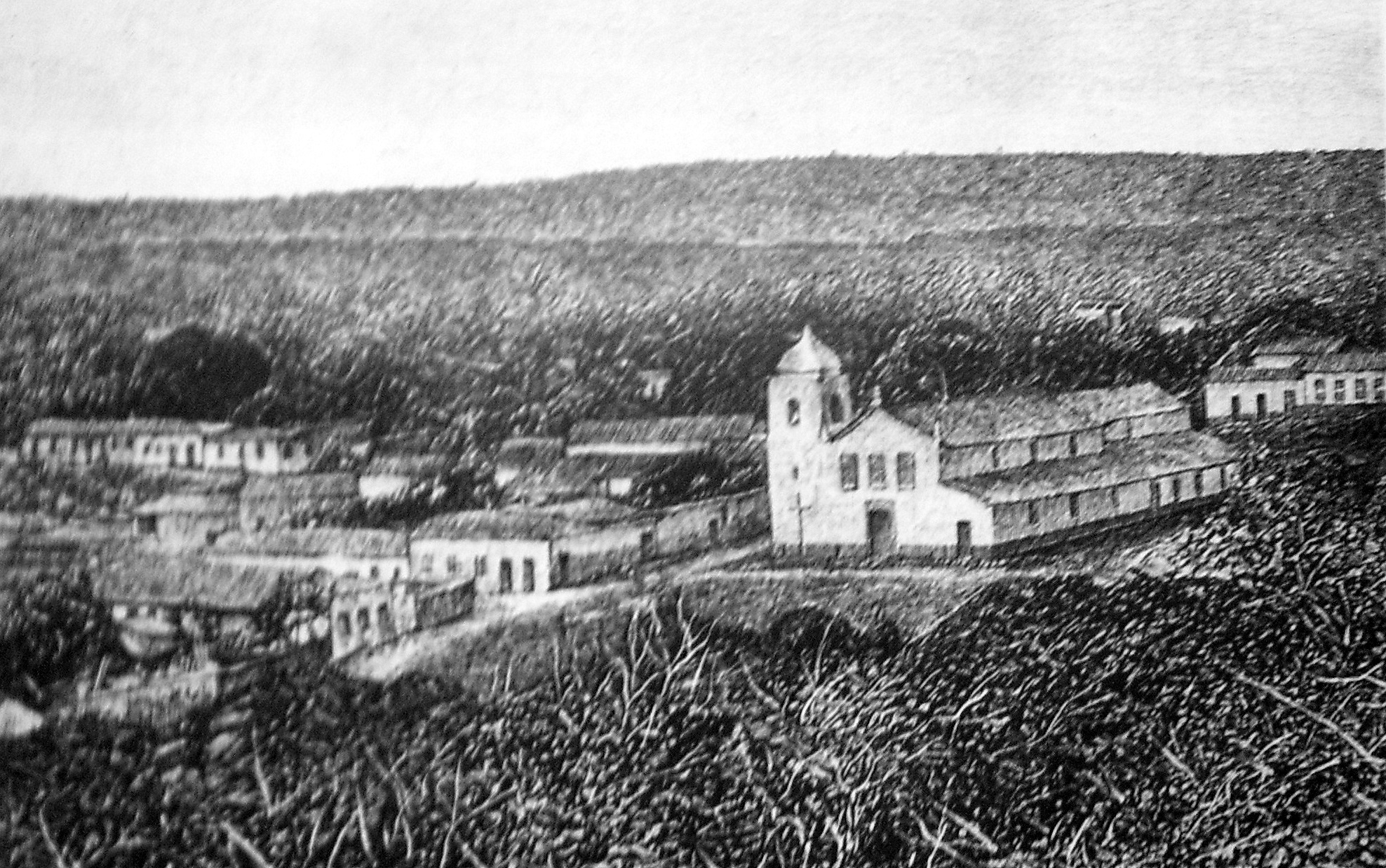 Gravura de Cuiabá, Mato Grosso, Brasil, tendo em destaque a igreja de Nossa Senhora do Rosário e São Benedito, feita pela expedição de Karl von den Steinen ao passar pela cidade.